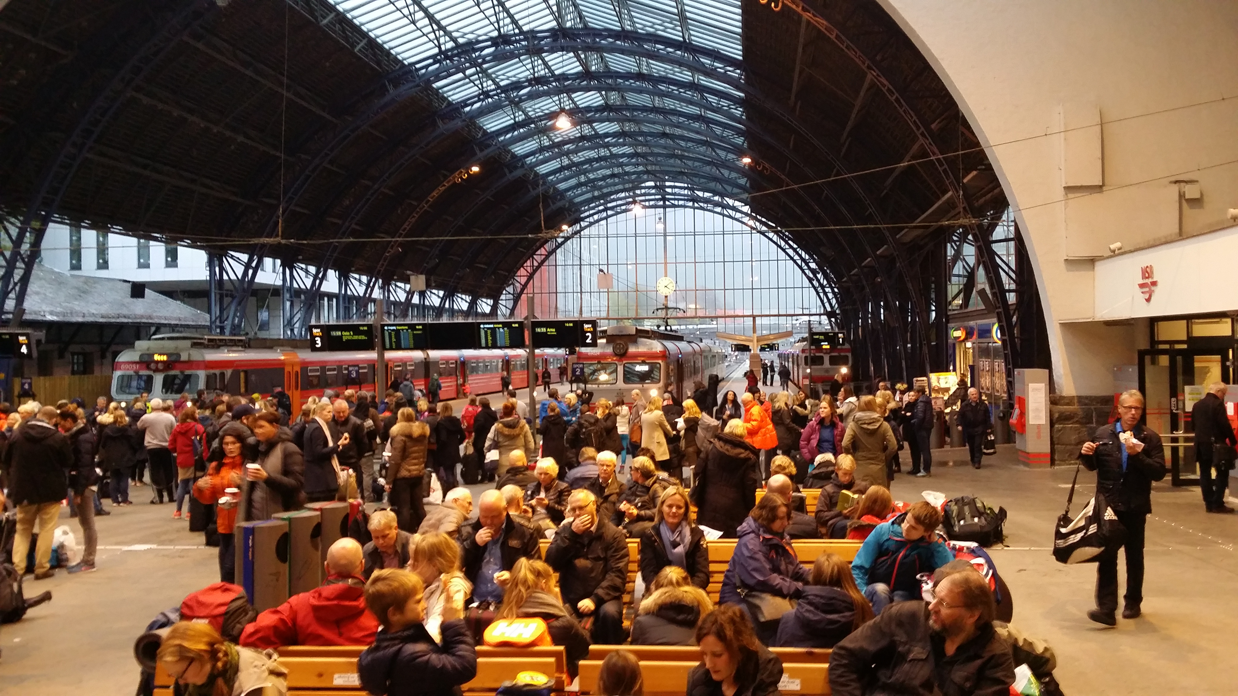 Bergen stasjon med lokaltog og ventende passasjerer.